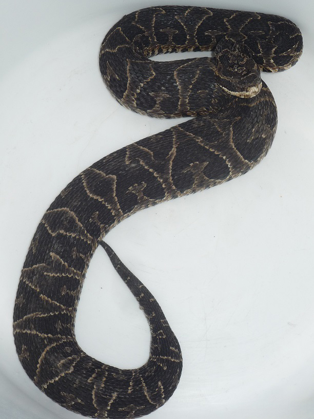 Foto de una Yarará de altura